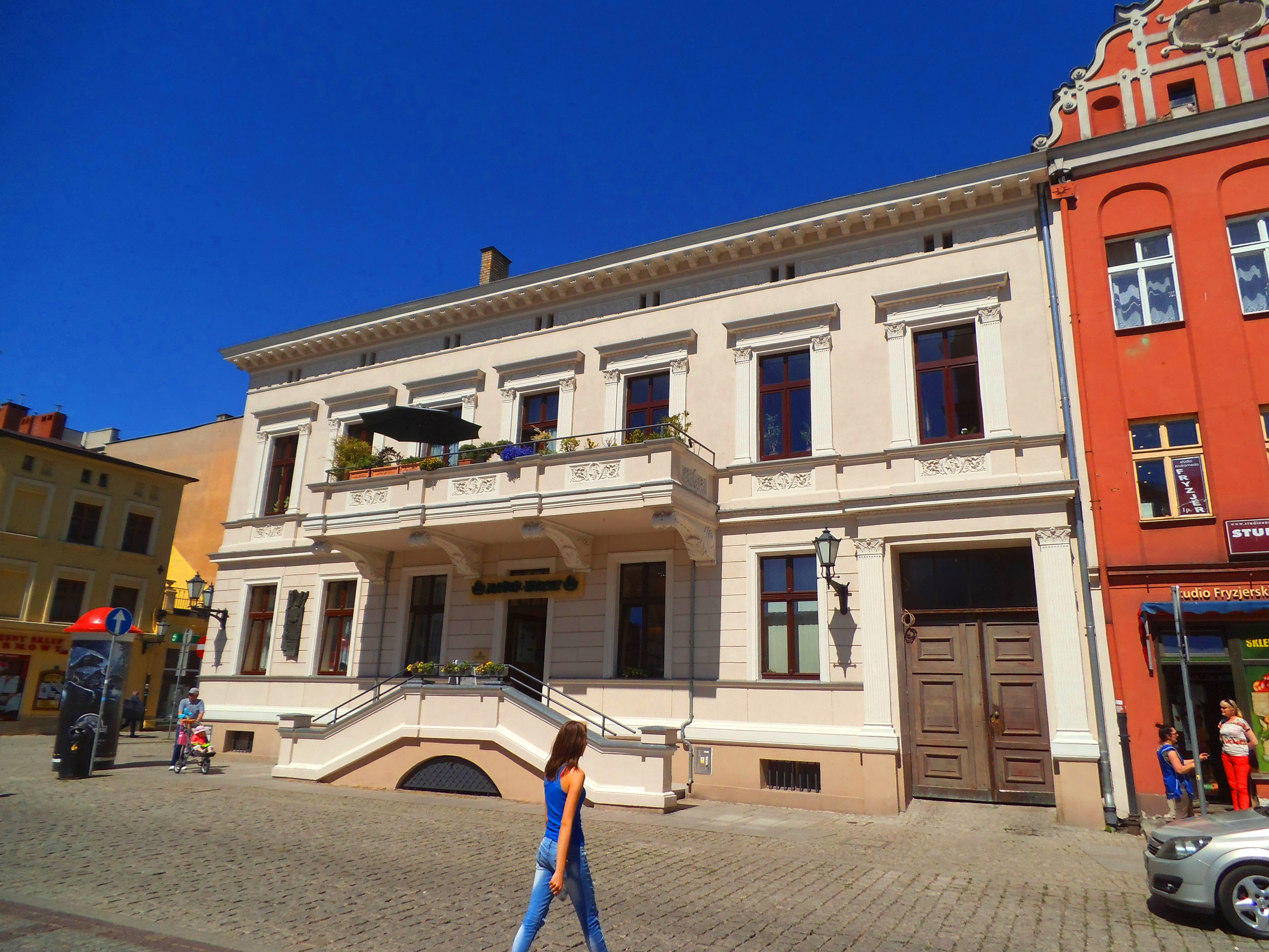 Budynek dawnej komendantury Twierdzy Toruń na Rynku Nowomiejskim (ob. budynek mieszkalny)